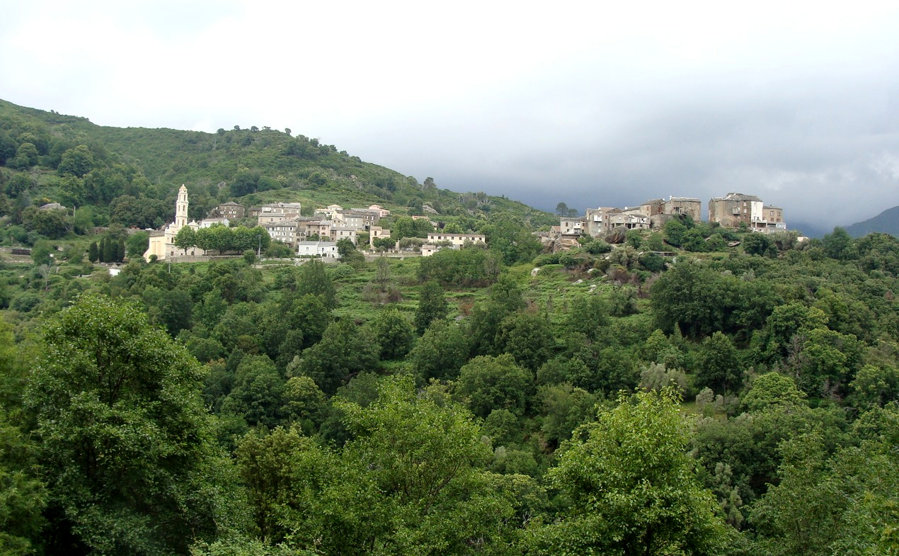 Le village de Pietra-di-Verde vu du sud (vue partielle)